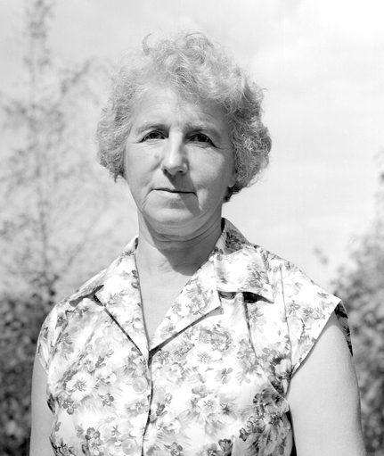 portrett, kvinne, prest, brystbilde. Rigmor Dahl Delphin (1908-1993) var ansatt som fotograf i ukebladet Alle Kvinner. Hennes negativarkiv ble i 2005 overført Oslo Bymuseum fra Gyldendal Norsk Forlag som var utgiver av bladet.